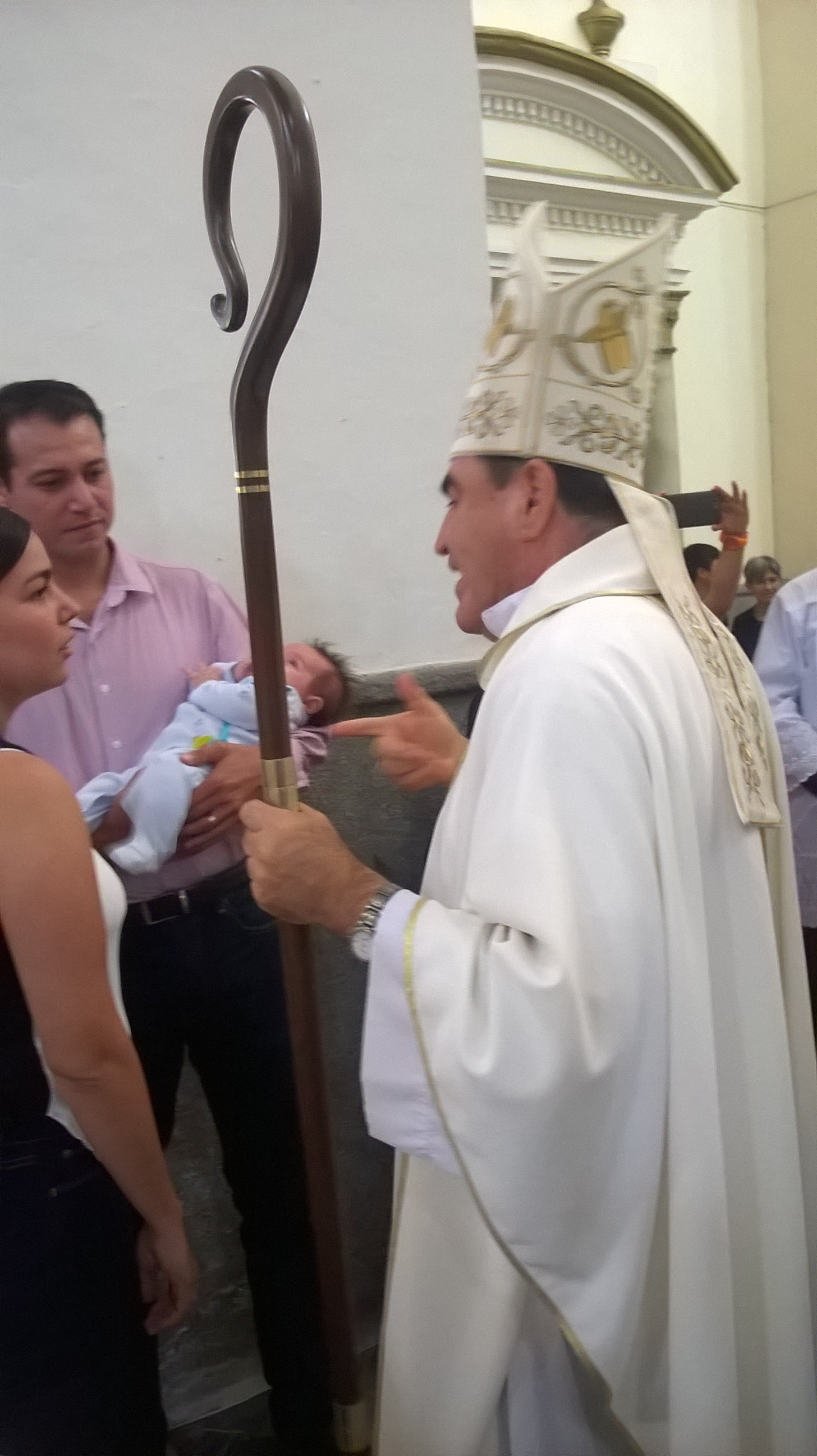 Mons. Eduardo Cervantes Merino